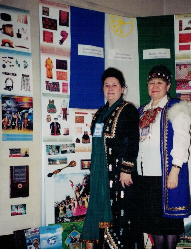 Выставка Башкортостана в Турции на съезде Ассоциации женщин тюркского мира